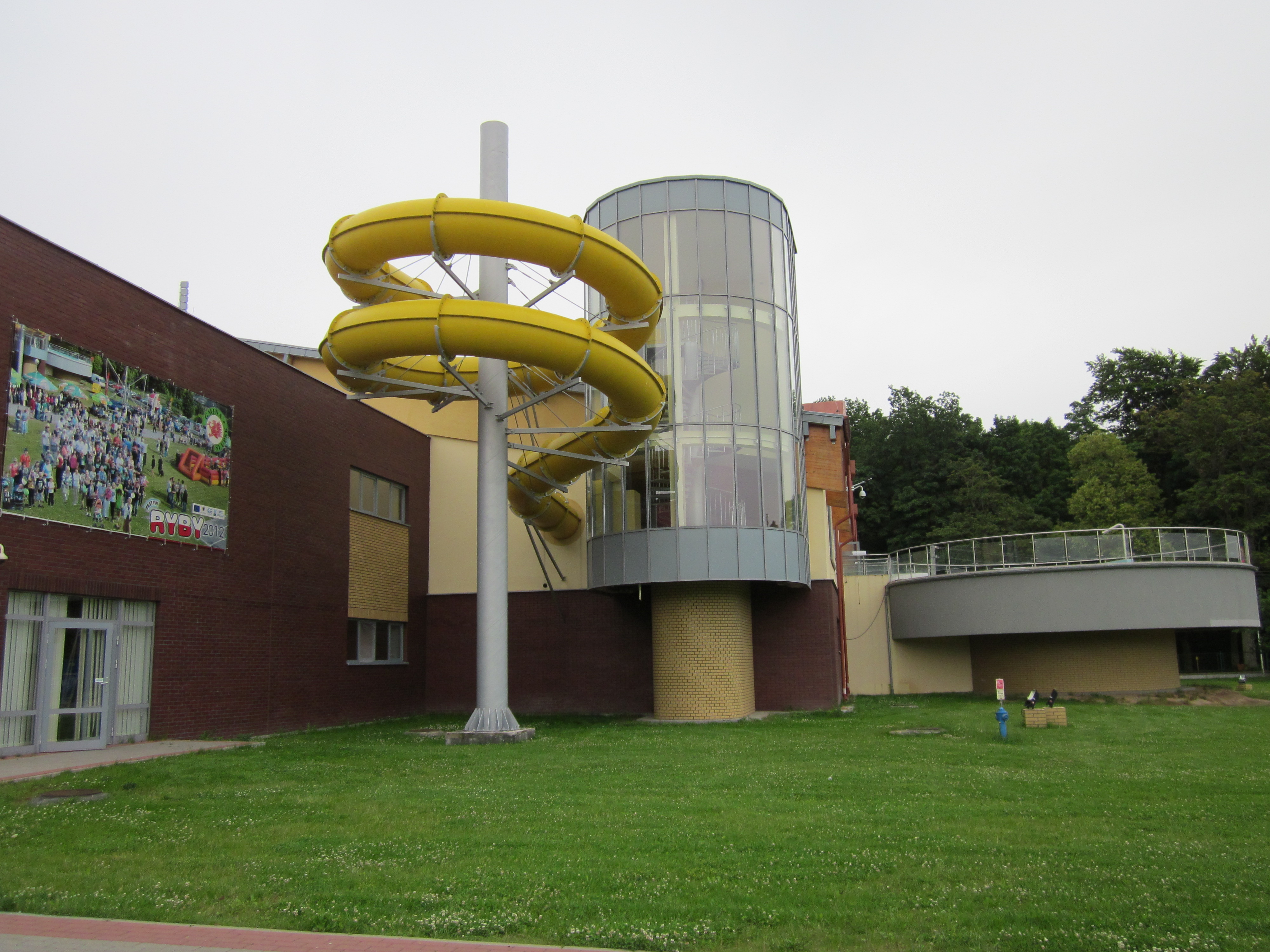 Park wodny znajduje się pod adresem Redzikowo16B.